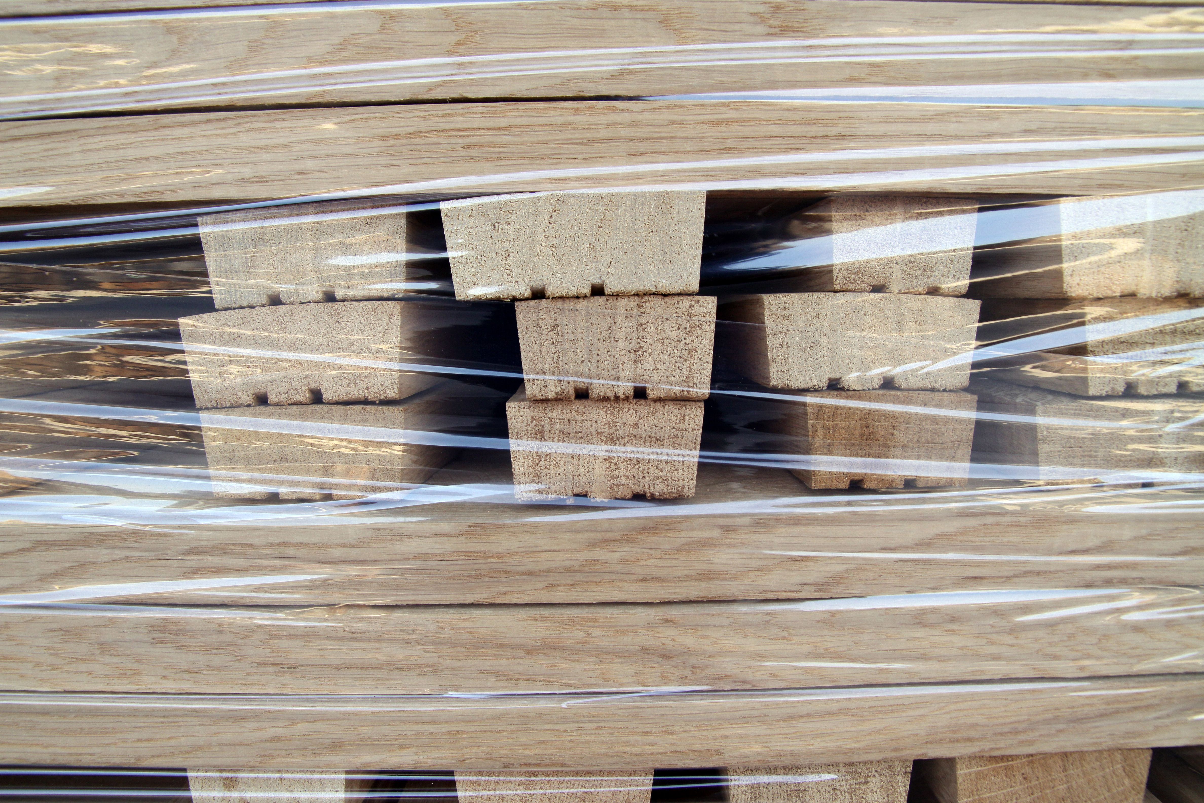 Douelles finies d'usiner en attente d'exportation